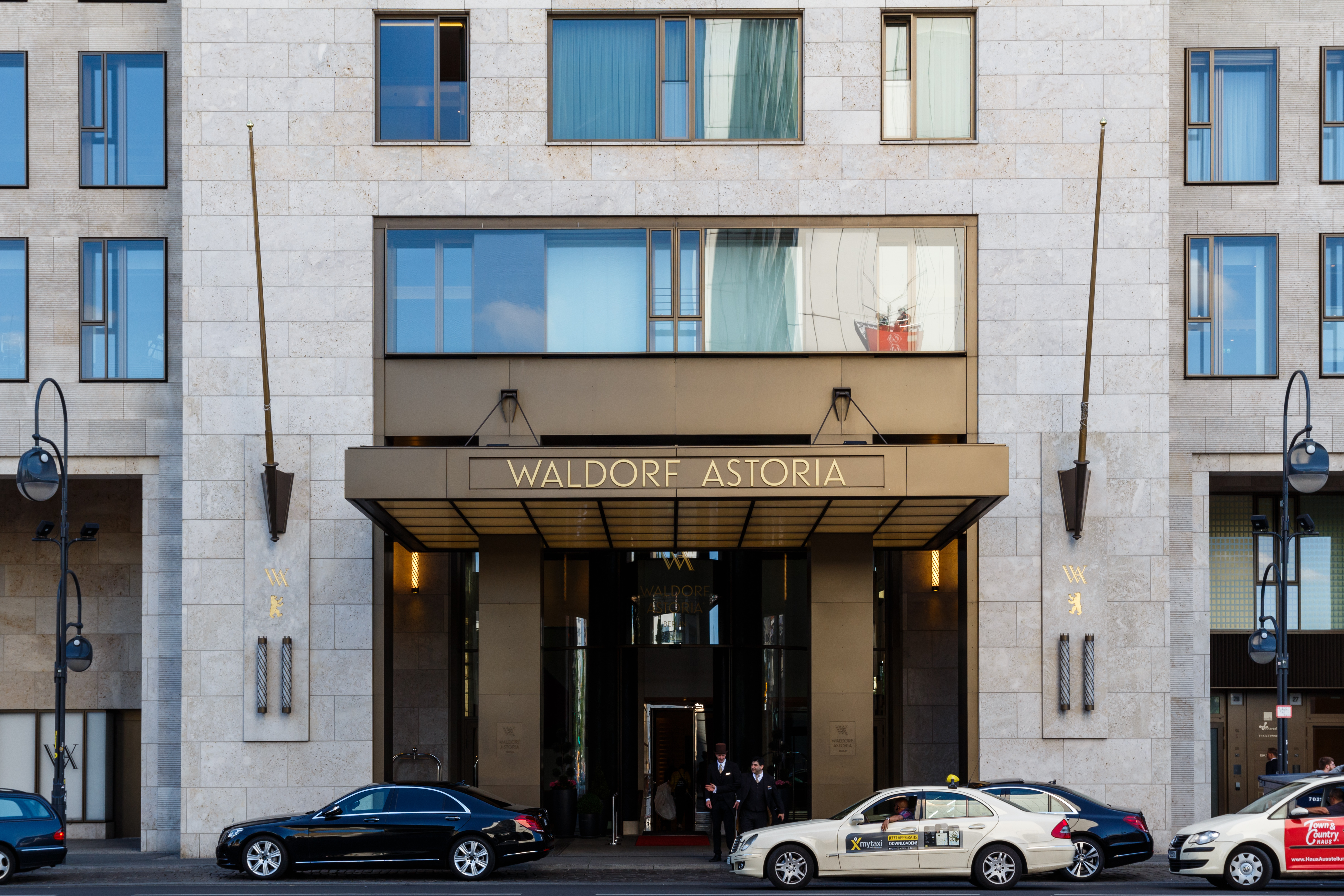 Eingang des Waldorf Astoria